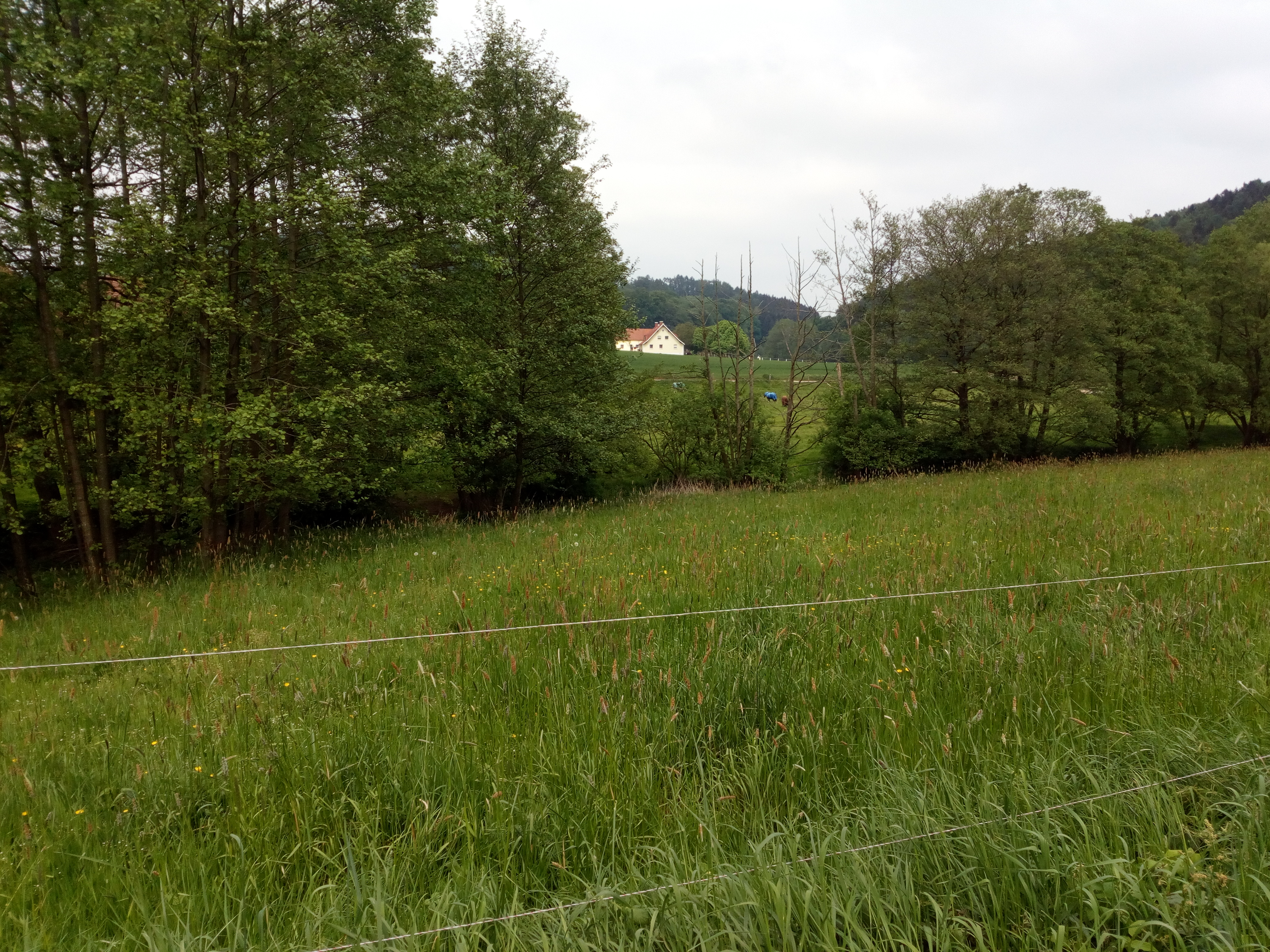 Naturschutzgebiet, Kennzeichen NSG WE 251 (SCI DE3616301). 110 Hektar groß. Von Menschen wenig verändert, seit 2007 unter Naturschutz.